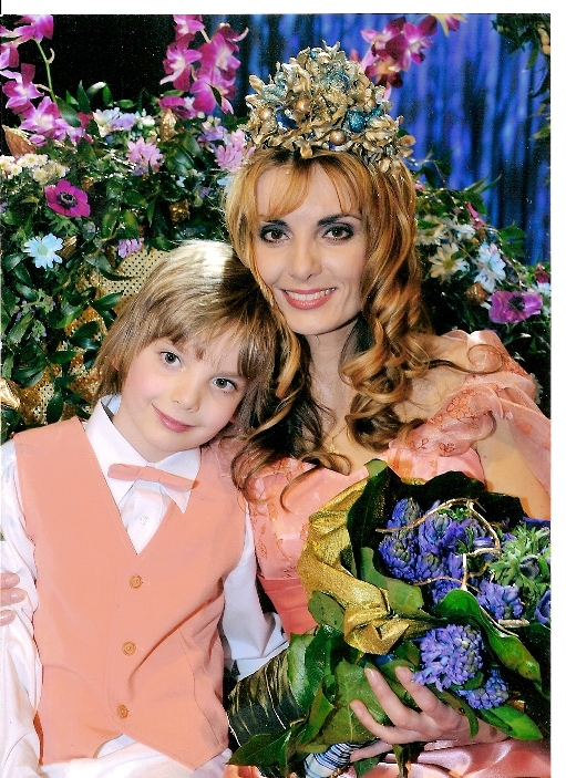 Soutěž Missis ČR 2009, Radana Vozňáková se synem Danielem